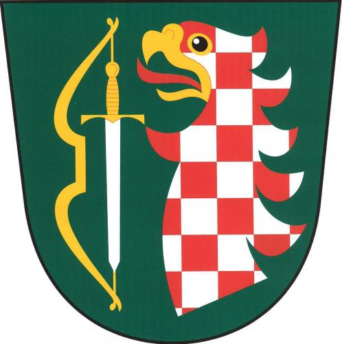 Nelešovice znak